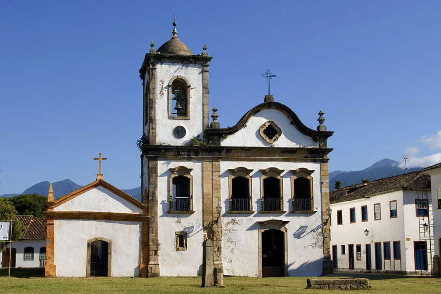 Endereço: Largo de Santa Rita, S/Nº – Paraty- RJ. Tel: (24) 3371 8328 Horários: De quarta a domingo, das 9h às 12h, e das 14h às 17h Foto: Divulgação IBRAM migre.me/cJCxT